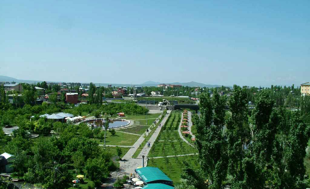 Kars